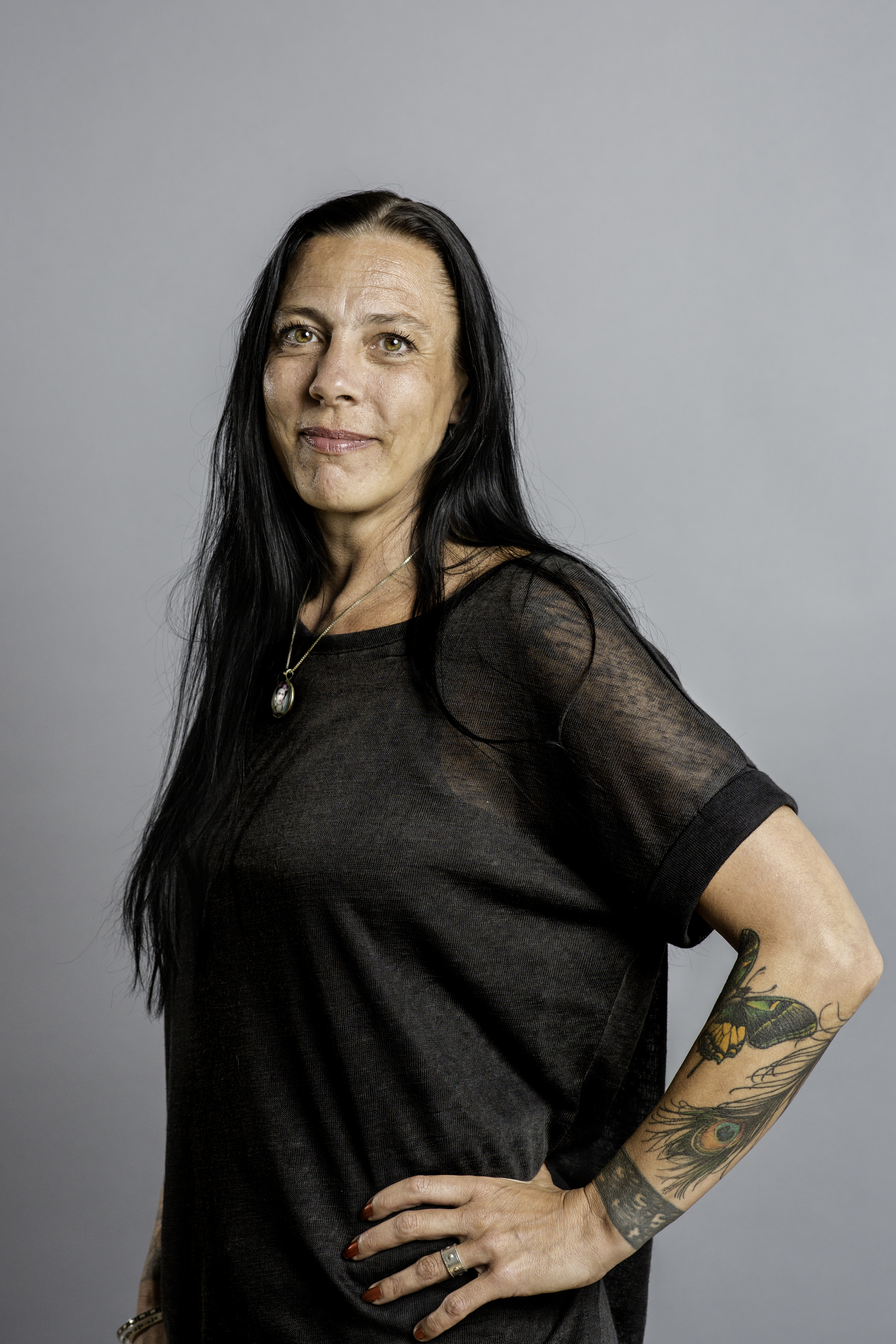 Ciczie Weidby. Vänsterpartiet. 2018.